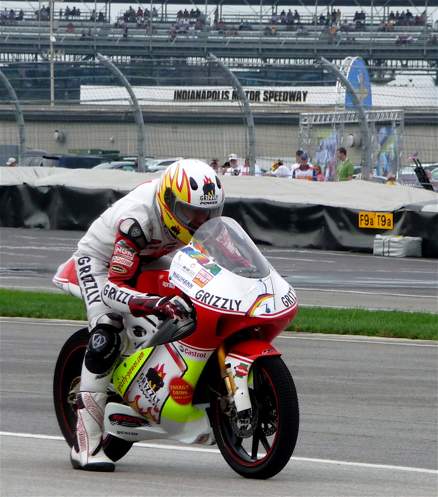 Robin Lasser a Indianapolis nel 2008.